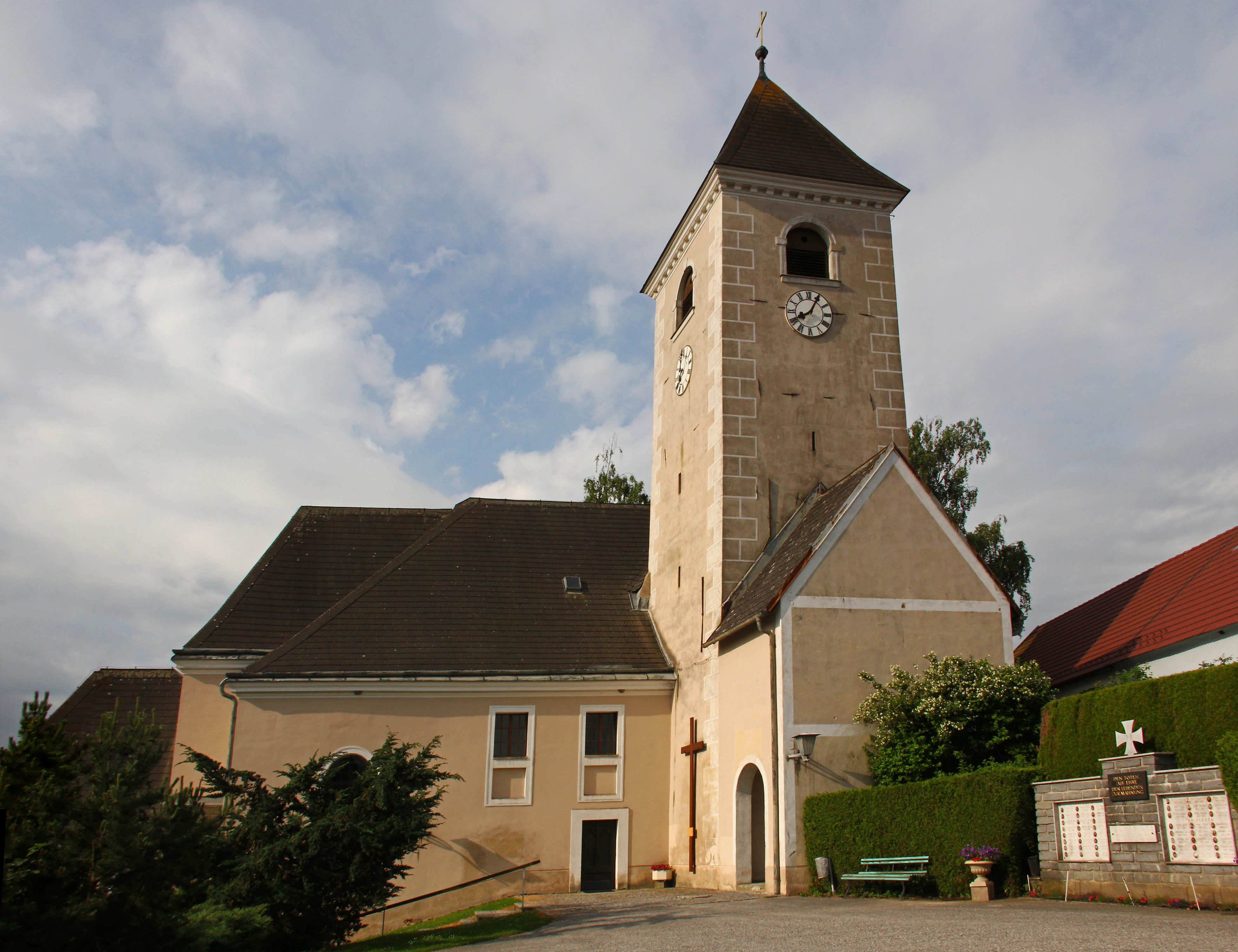 Die Pfarrkirche St. Anna, erhöht im Westen über dem Ort am Anstieg einer Geländestufe gelegen, ist von der Mauer des ehemaligen Friedhofs umgeben.